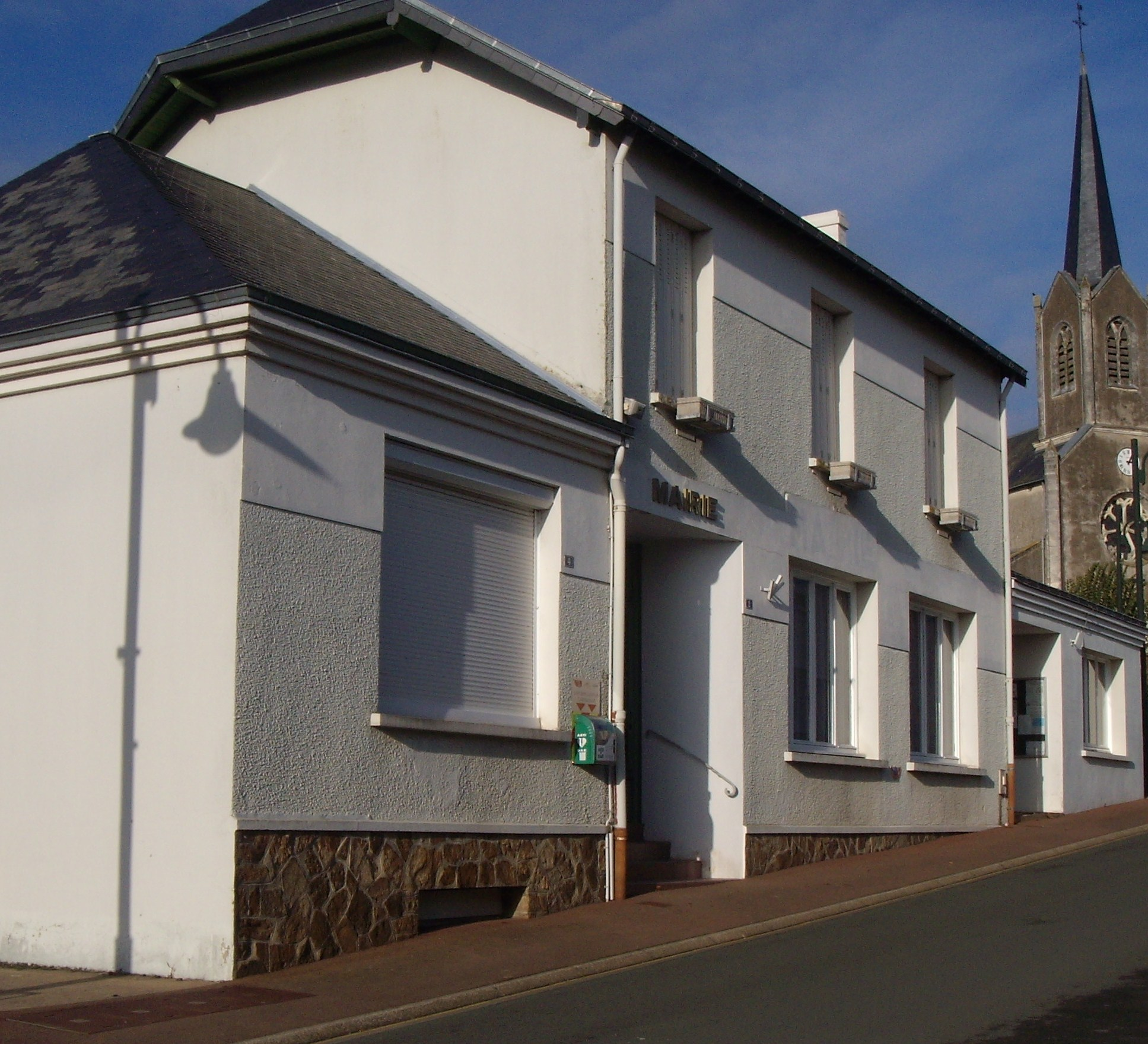 Mairie de Saint-Germain-sur-Moine